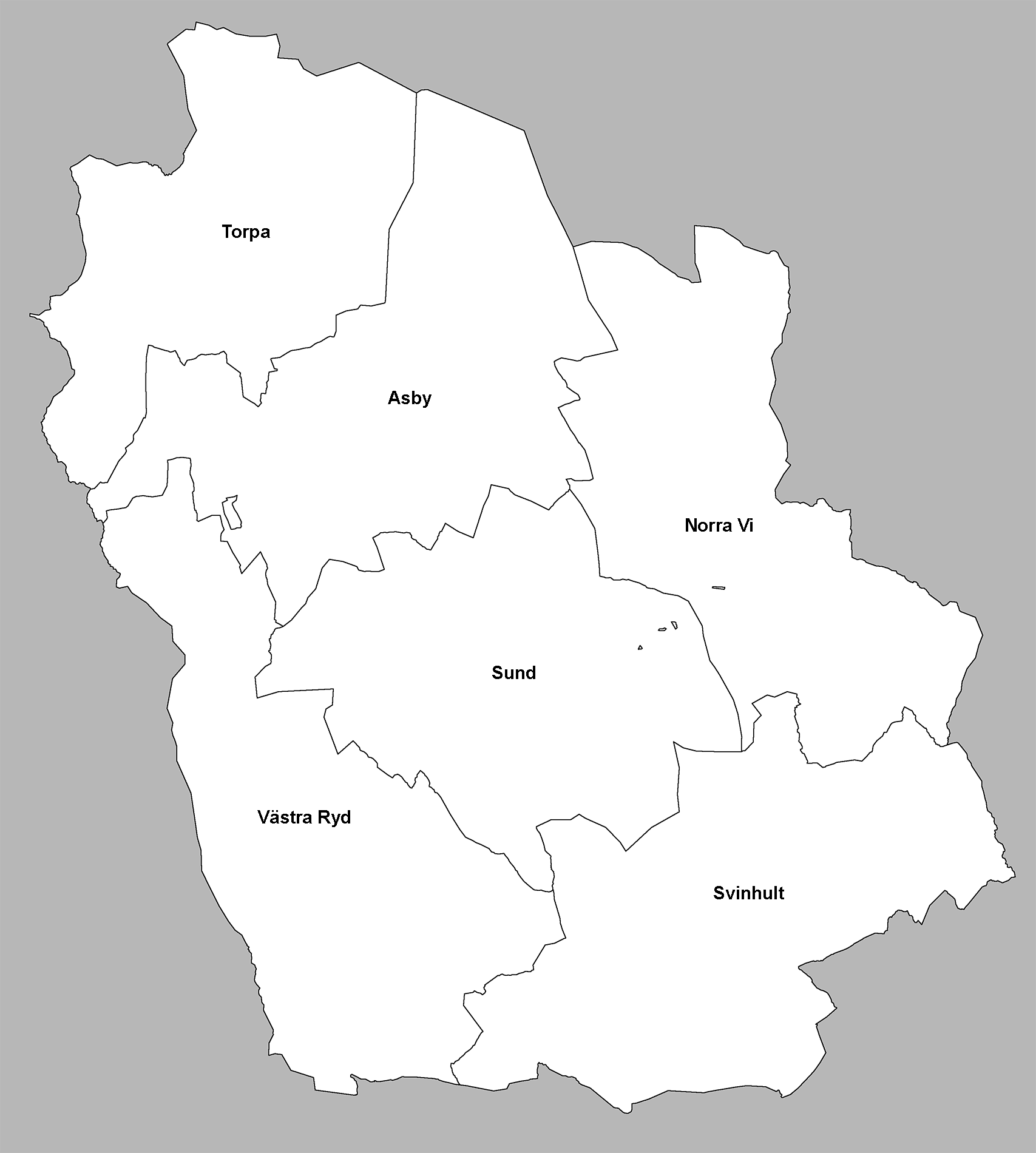 Karta över Ydre landskommun (1952-1970), baserad på Ekonomiska kartan.